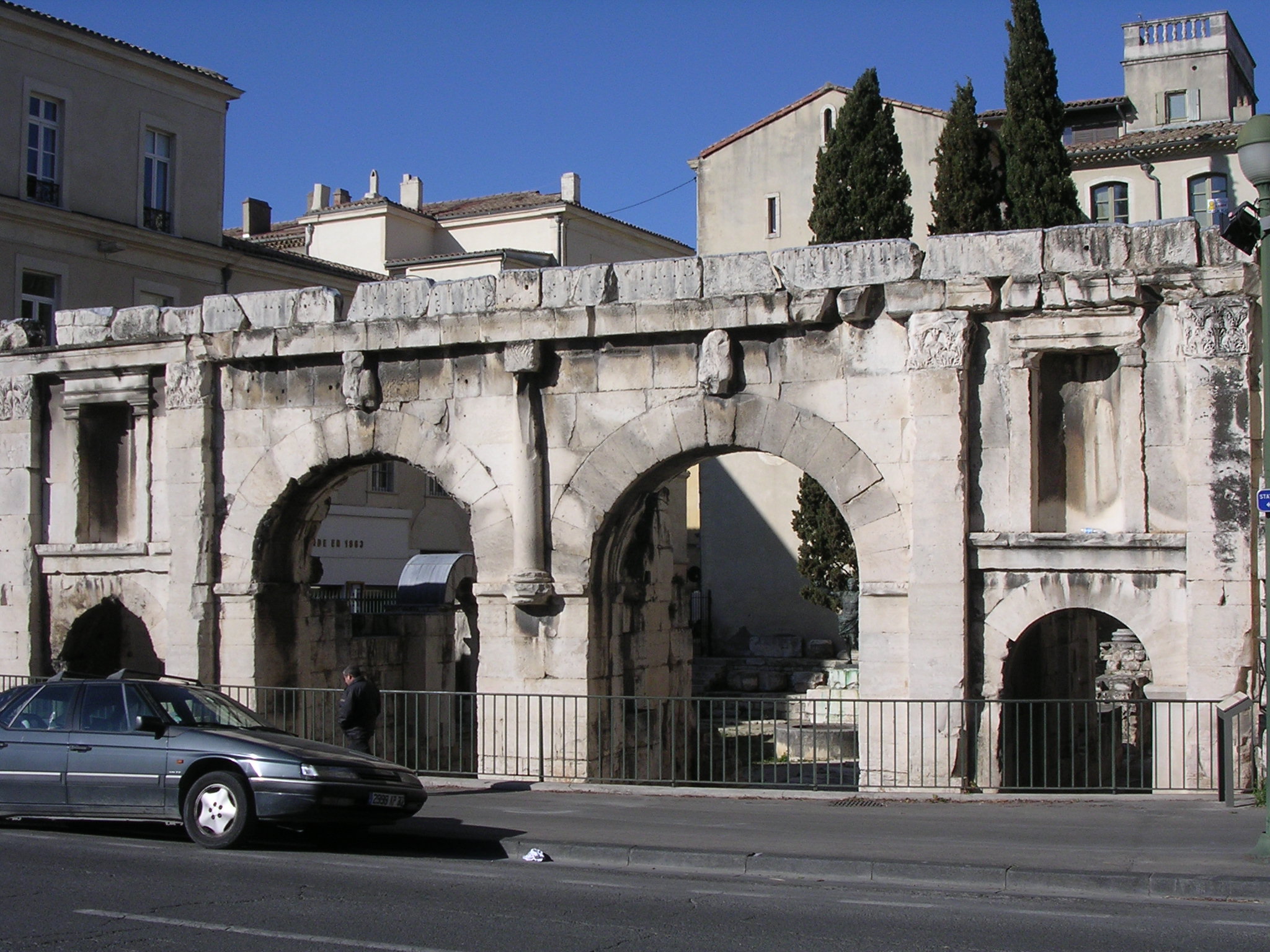 Nîmes (Gard, France), la porte d'Auguste, anciennement d'Arelate (Arles), entrée de l'antique via Domitia dans la ville et vestige principal de l'enceinte gallo-romaine ceinturant la cité.